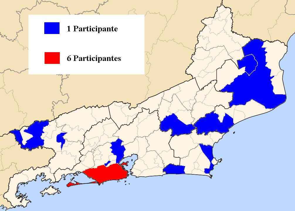 Mapa dos municípios participantes da Primeira Divisão.